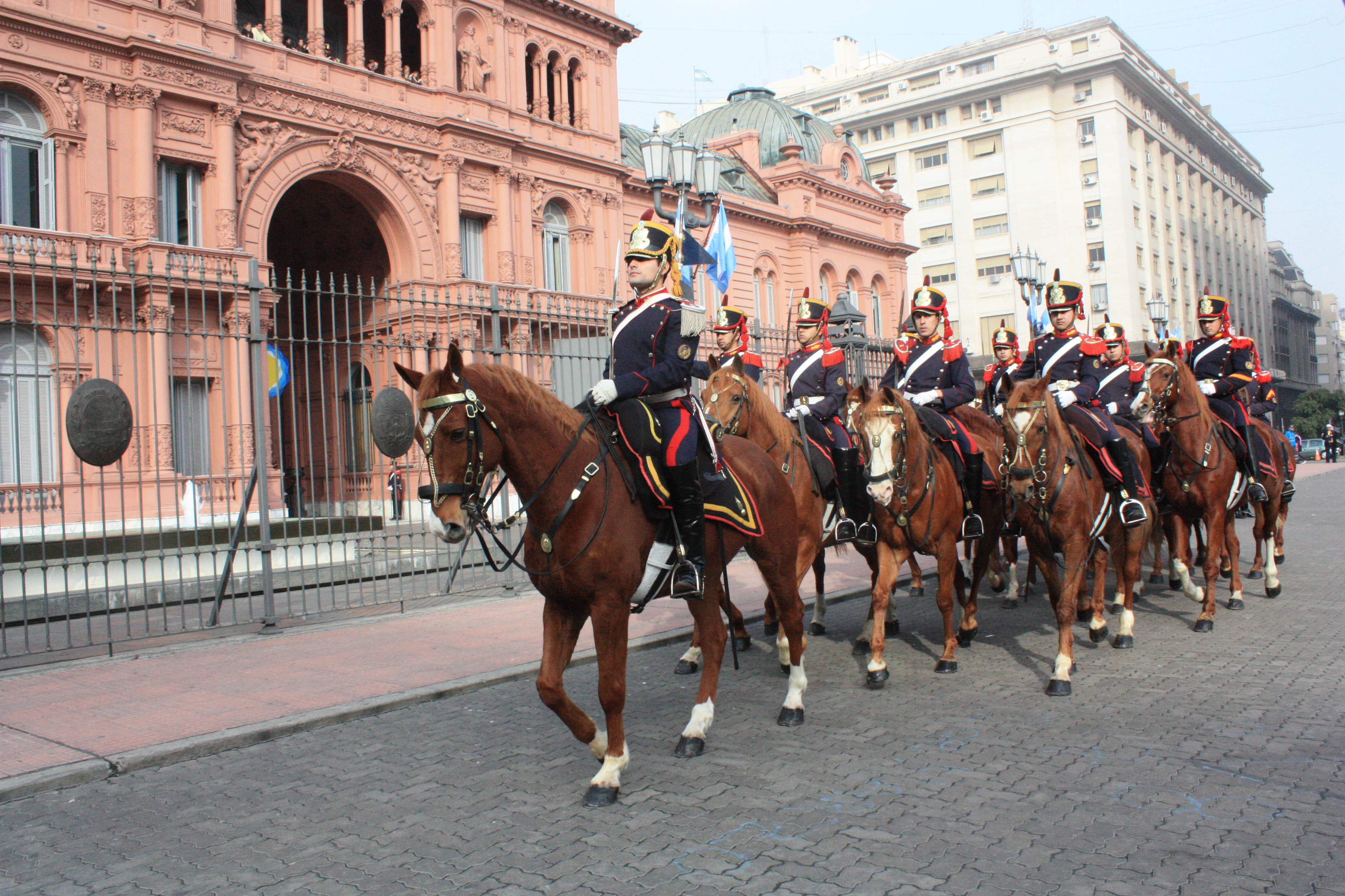 Casa de Gobierno